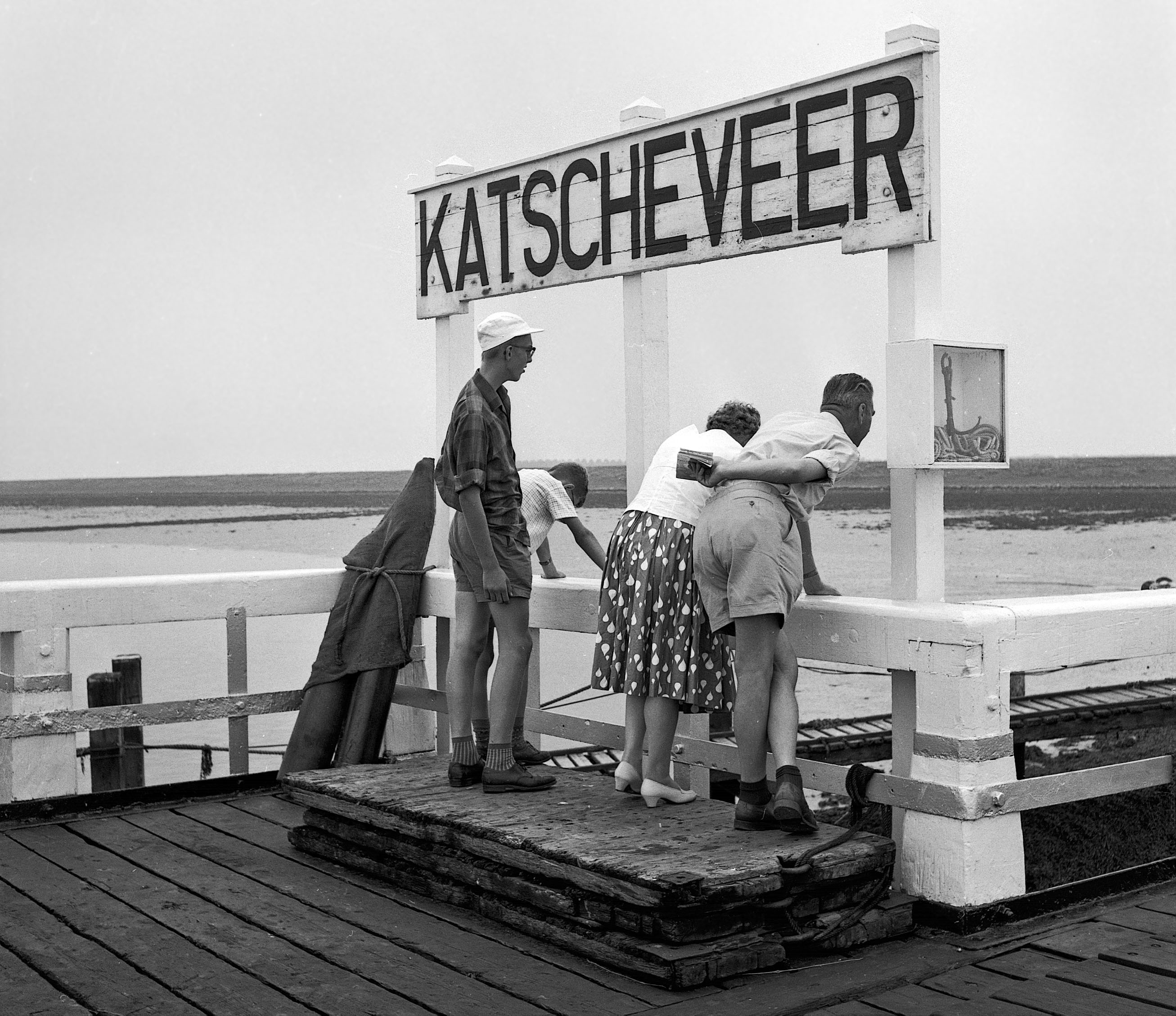 Katsche veer van de oude werkhaven van Kats naar Zierikzee (na de Deltawerken opgeheven)